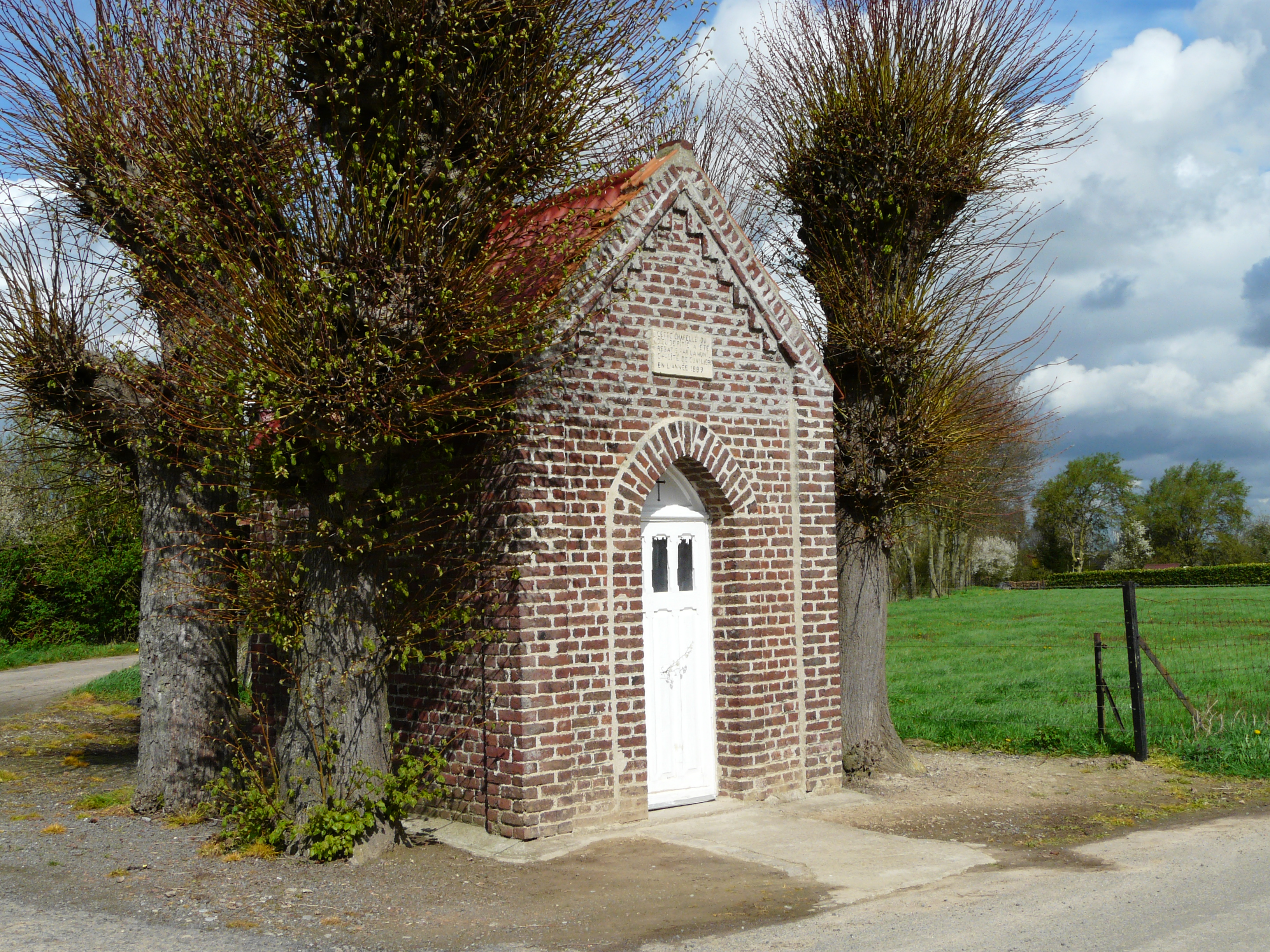 La chapelle du Dieu de Pitié, Cuvillers (Nord)